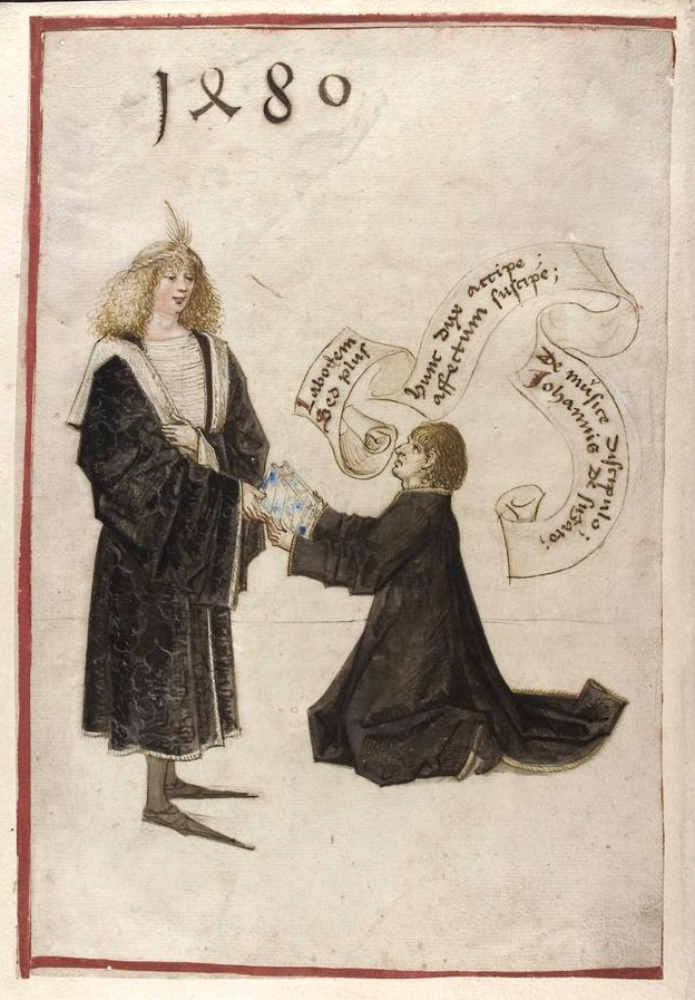 Cod. Pal. germ. 87, Seite: XVI: Johann von Soest, "Die Kinder von Limburg". Johann von Soest übergibt seinem Gönner Kurfürst Philipp dem Aufrichtigen sein Werk. Ein Zeichner aus der Werkstatt der Mainzer Riesenbibel. Vgl. Elgin Vaassen: Die Werkstatt der Mainzer Riesenbibel in Würzburg und ihr Umkreis. In: Archiv für Geschichte des Buchwesens 13 (1972/73), Spalten 1121-1428.